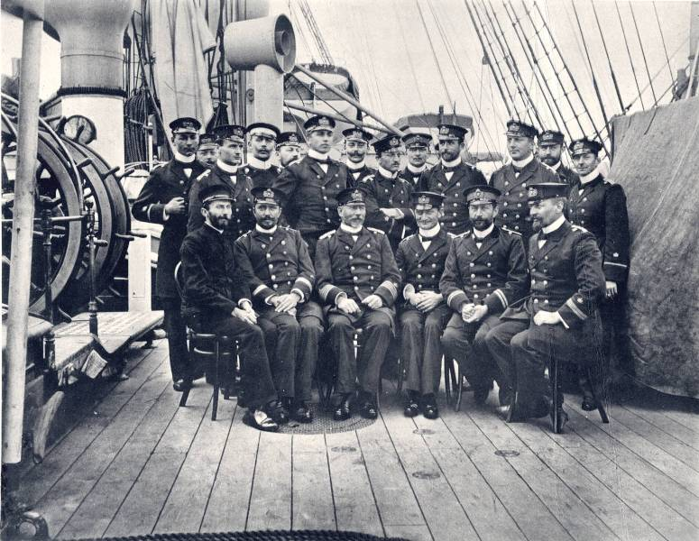 1898. Der Kommandant der CHARLOTTE, KzS Friedrich Vüllers im Kreise seiner Offiziere. Aus SCHIFF-Profile Heft 18